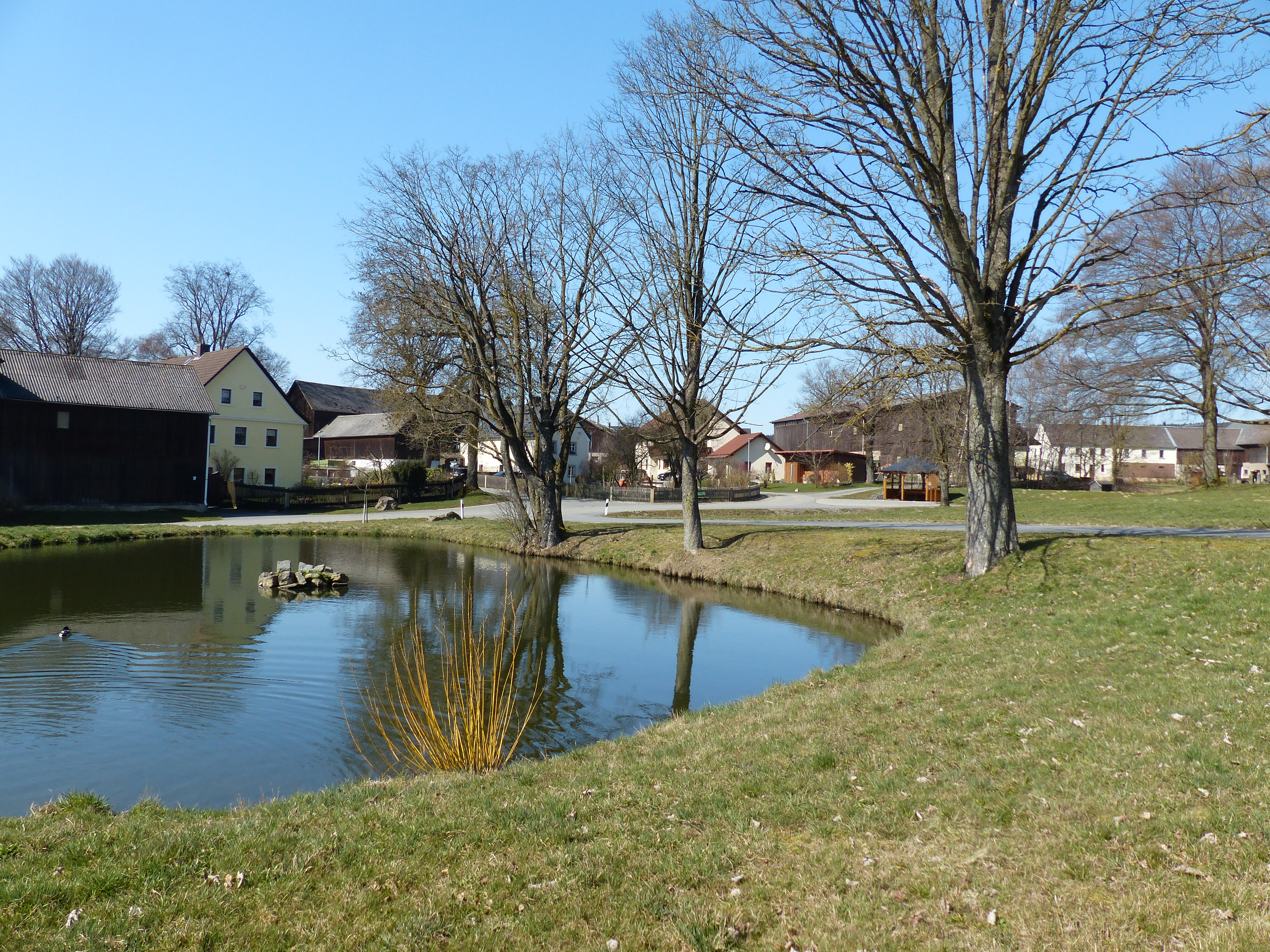 Ansichten vom Ortsteil Brunn